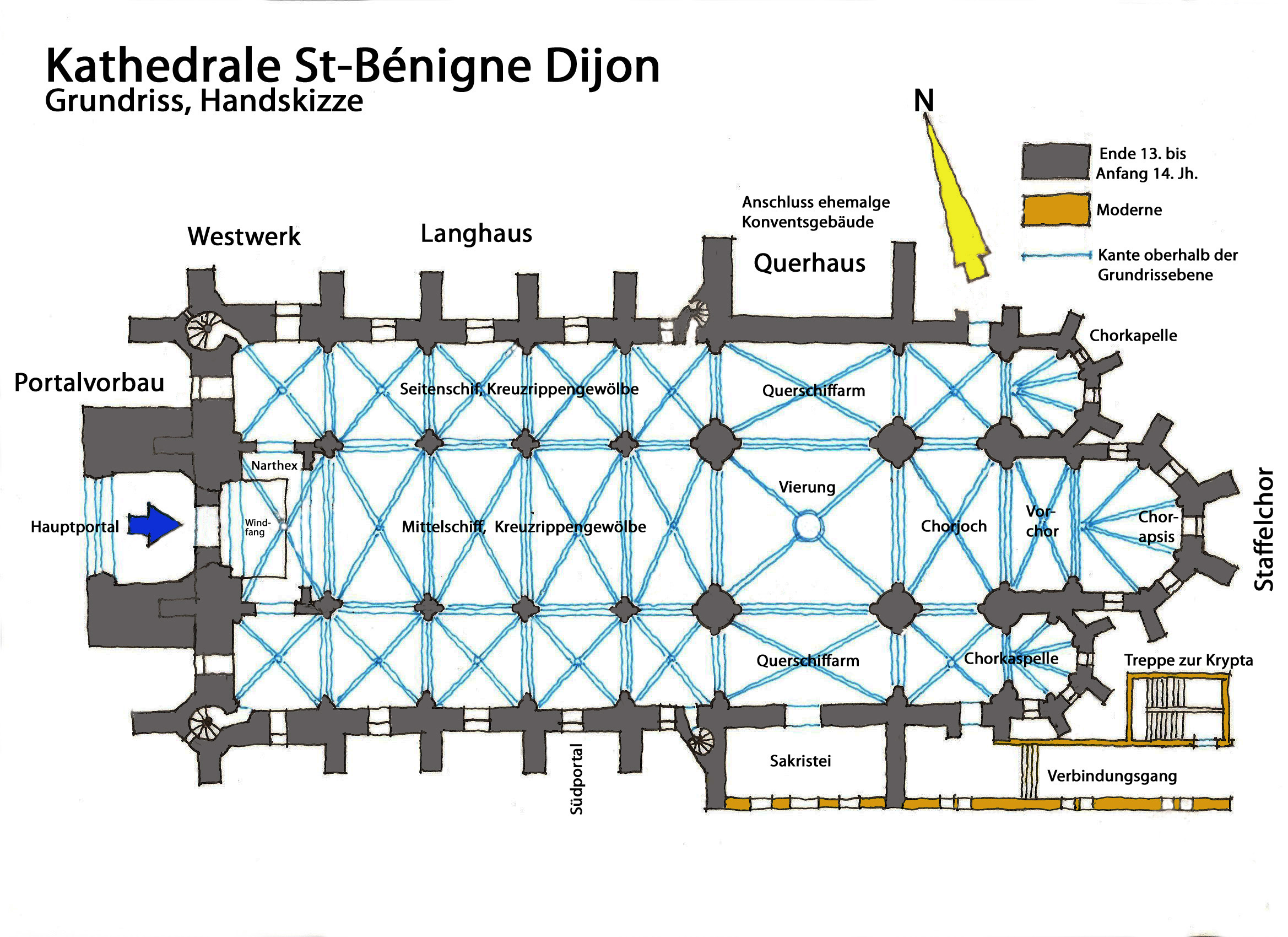 Kathedrale St-Bénigne Dijon, Grundriss